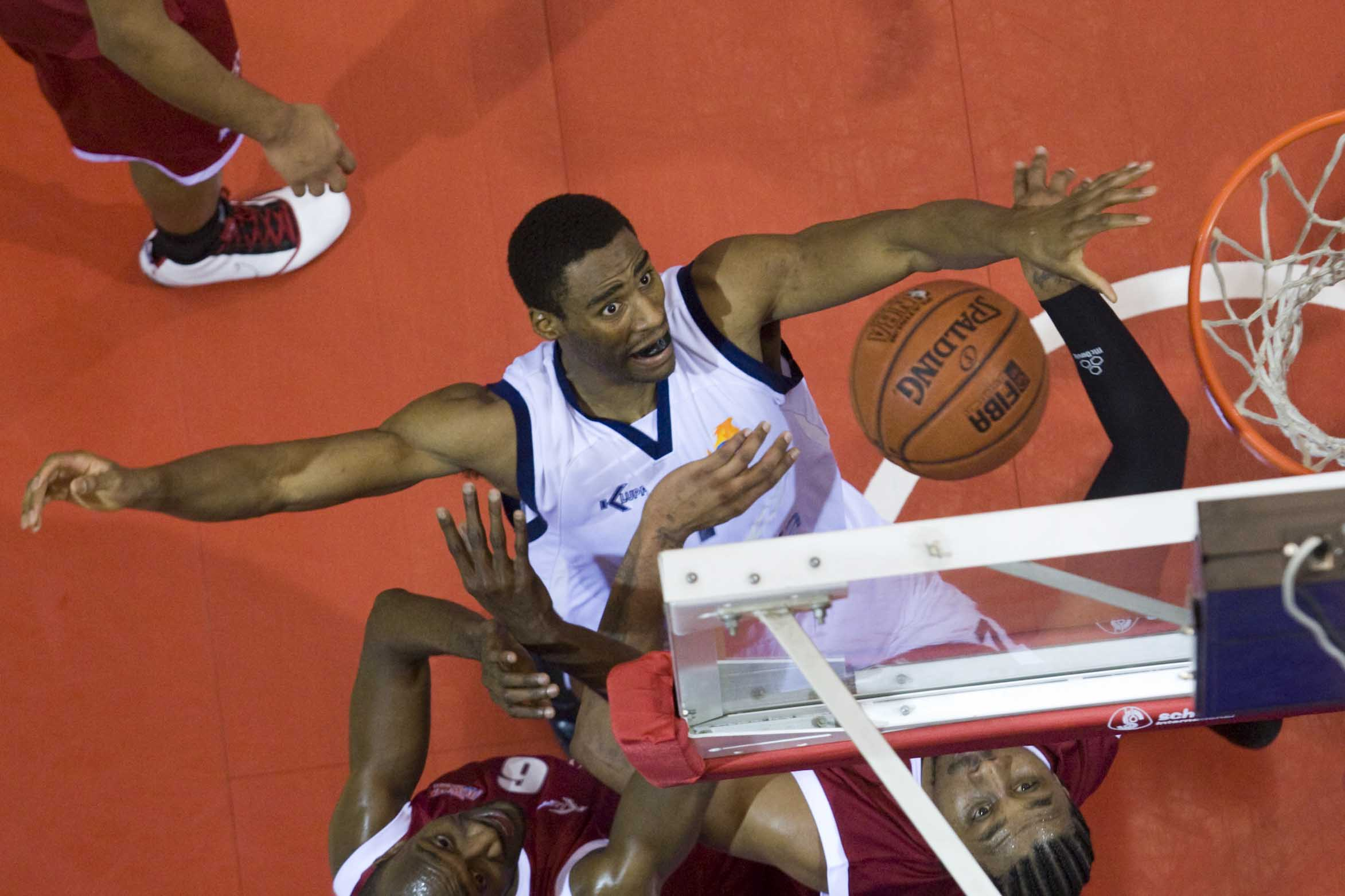 T2_Q9H9927 Basketbalwedstrijd in de Dutch Basketball League tussen GasTerra Flames en EiffelTowers Den Bosch.